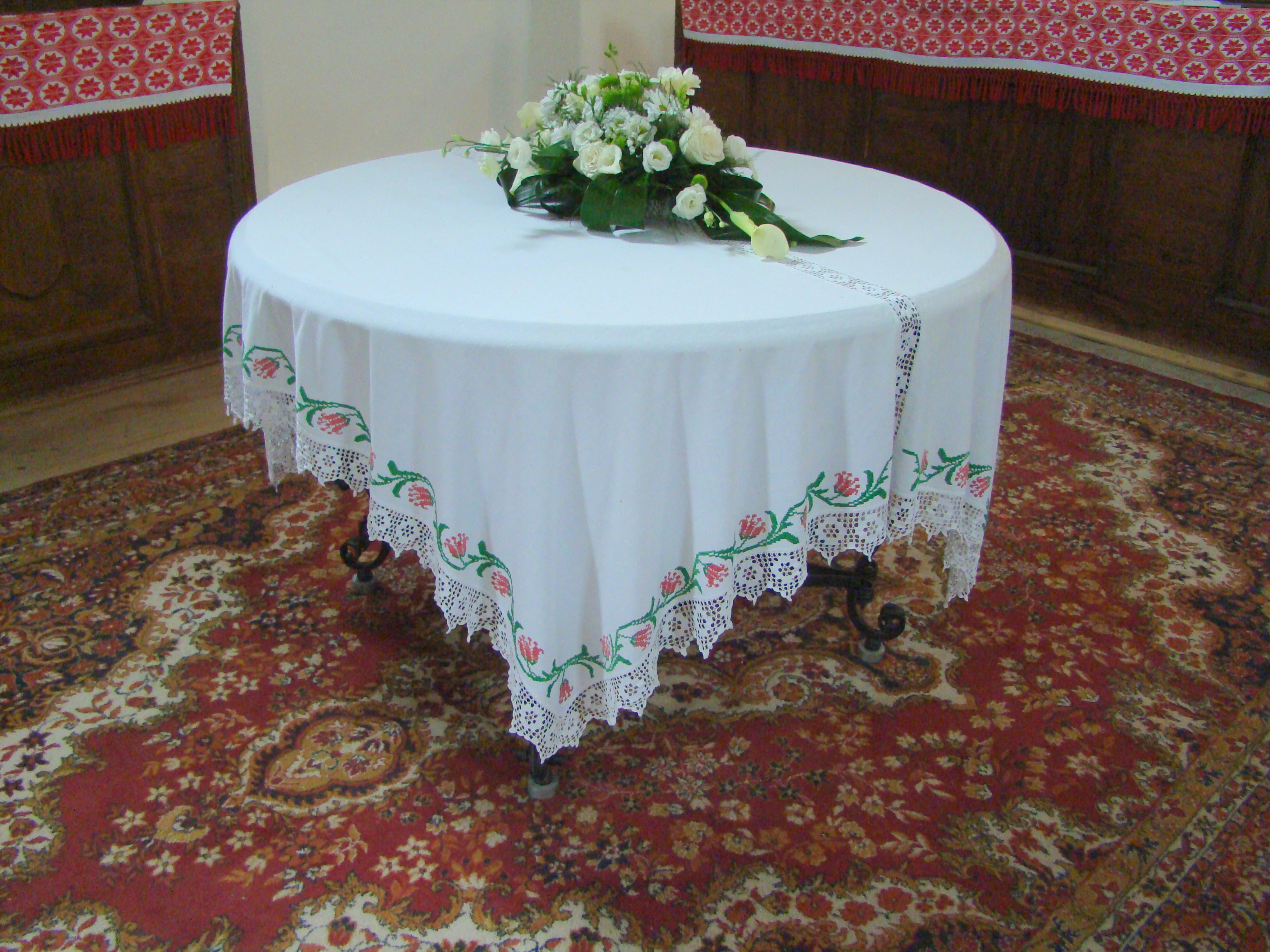 Biserica reformată, sat Bonțida; comuna Bonțida 01